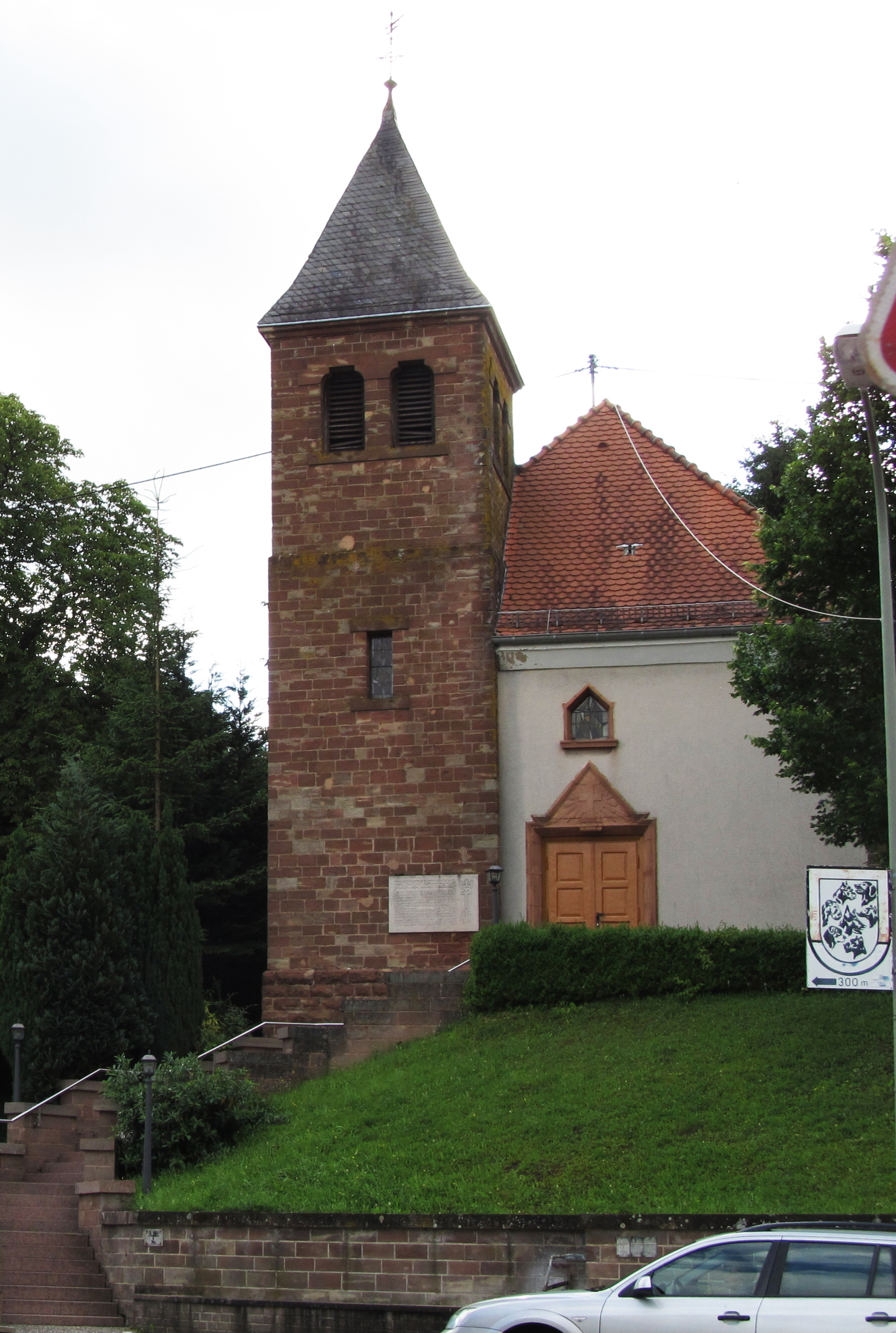 Die protestantische Kirche in Bliesdalheim, Saarland